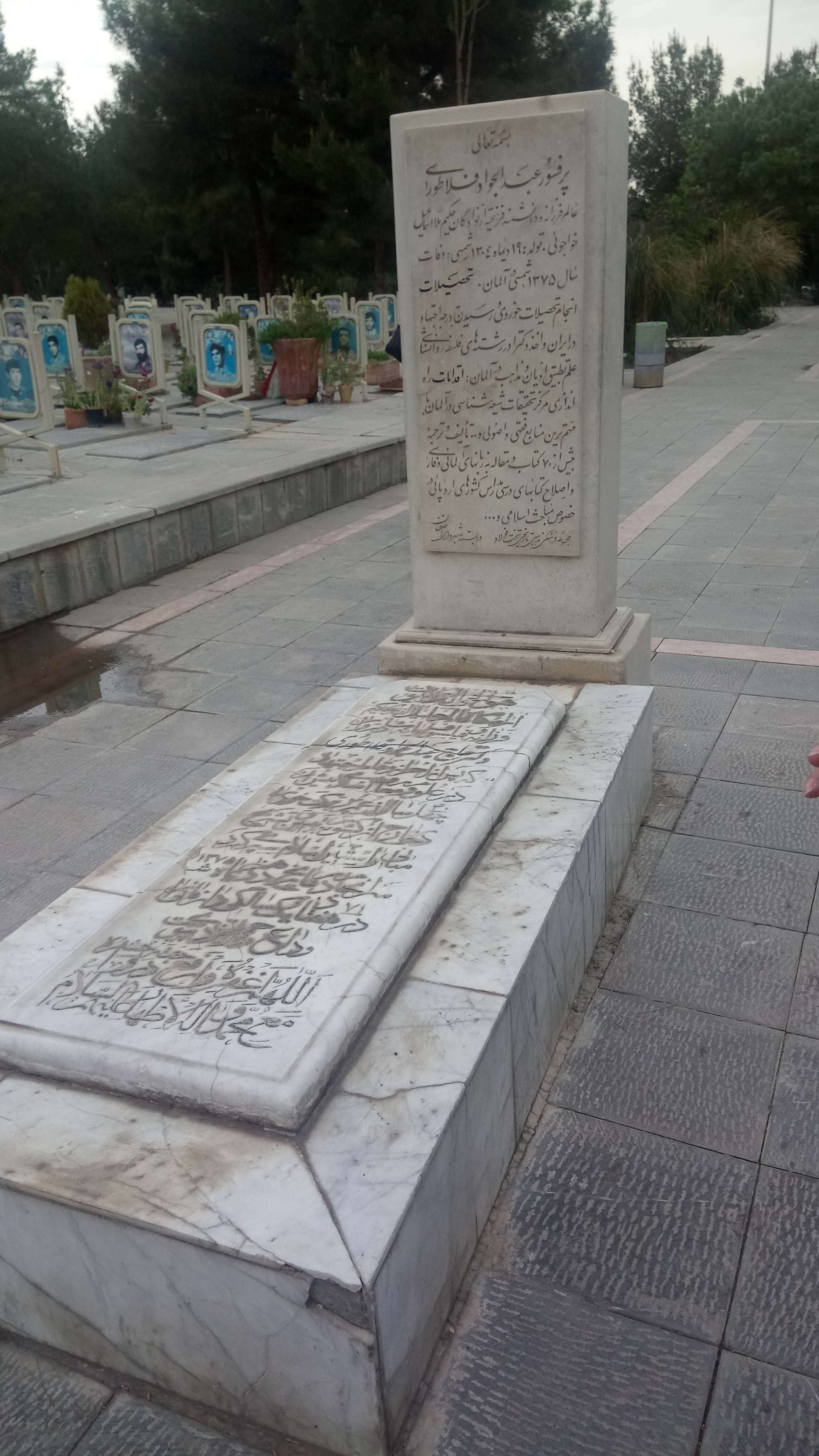 قبر پرفسور فلاطوری